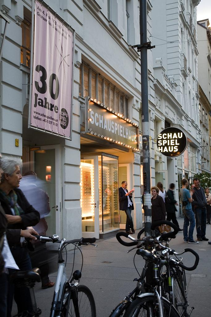 Schauspielhaus Front